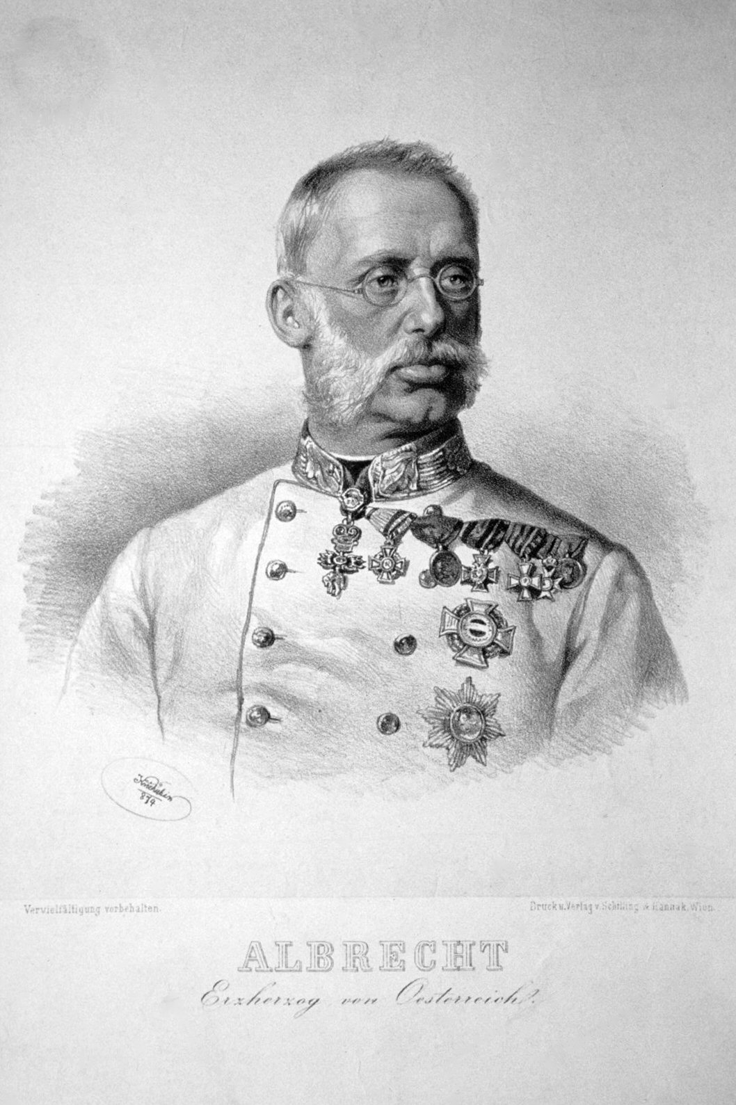 Albrecht von Österreich-Teschen (1817-1895), k. u. k. Feldmarschall